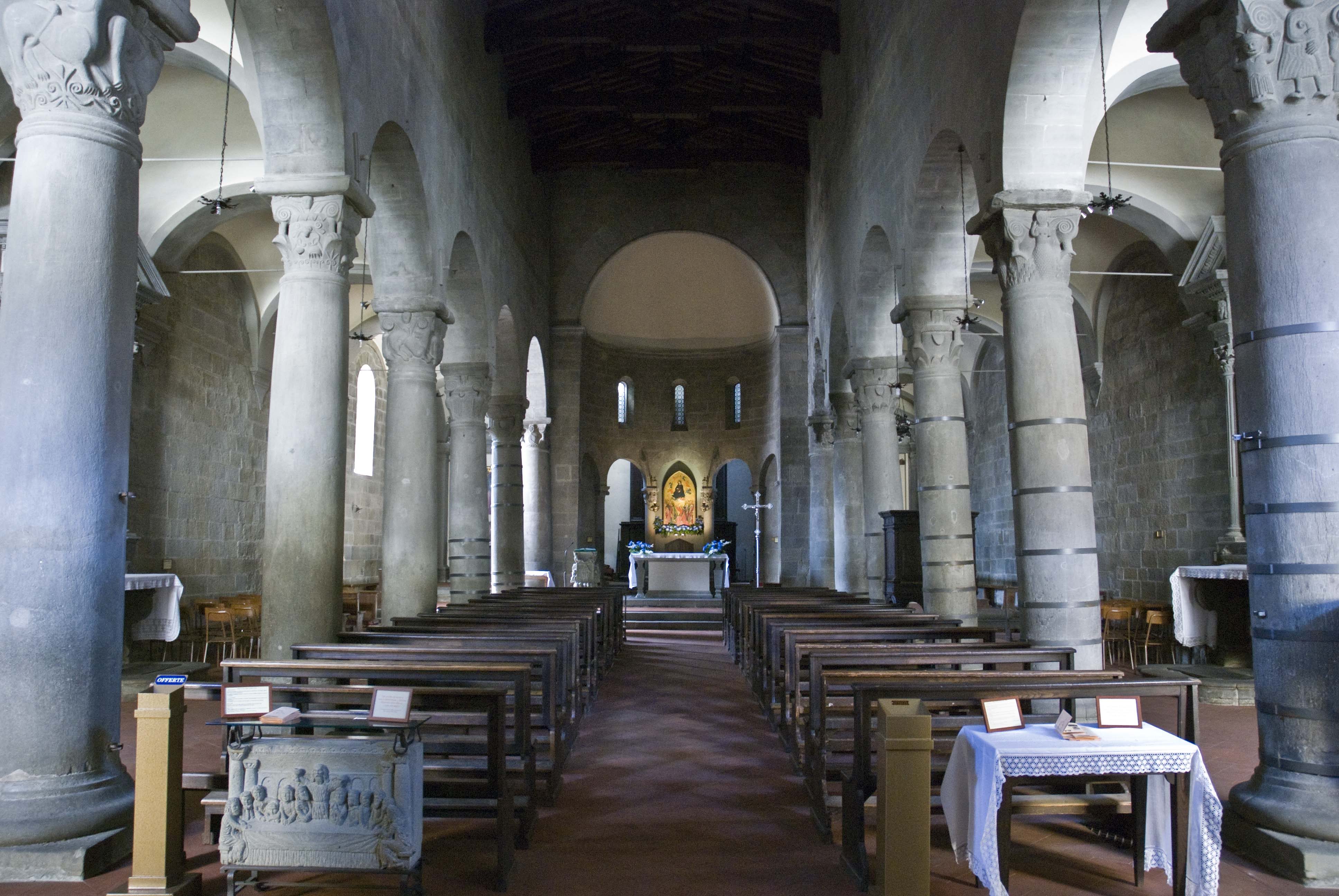 Interno della Pieve di Santa Maria Assunta a Stia